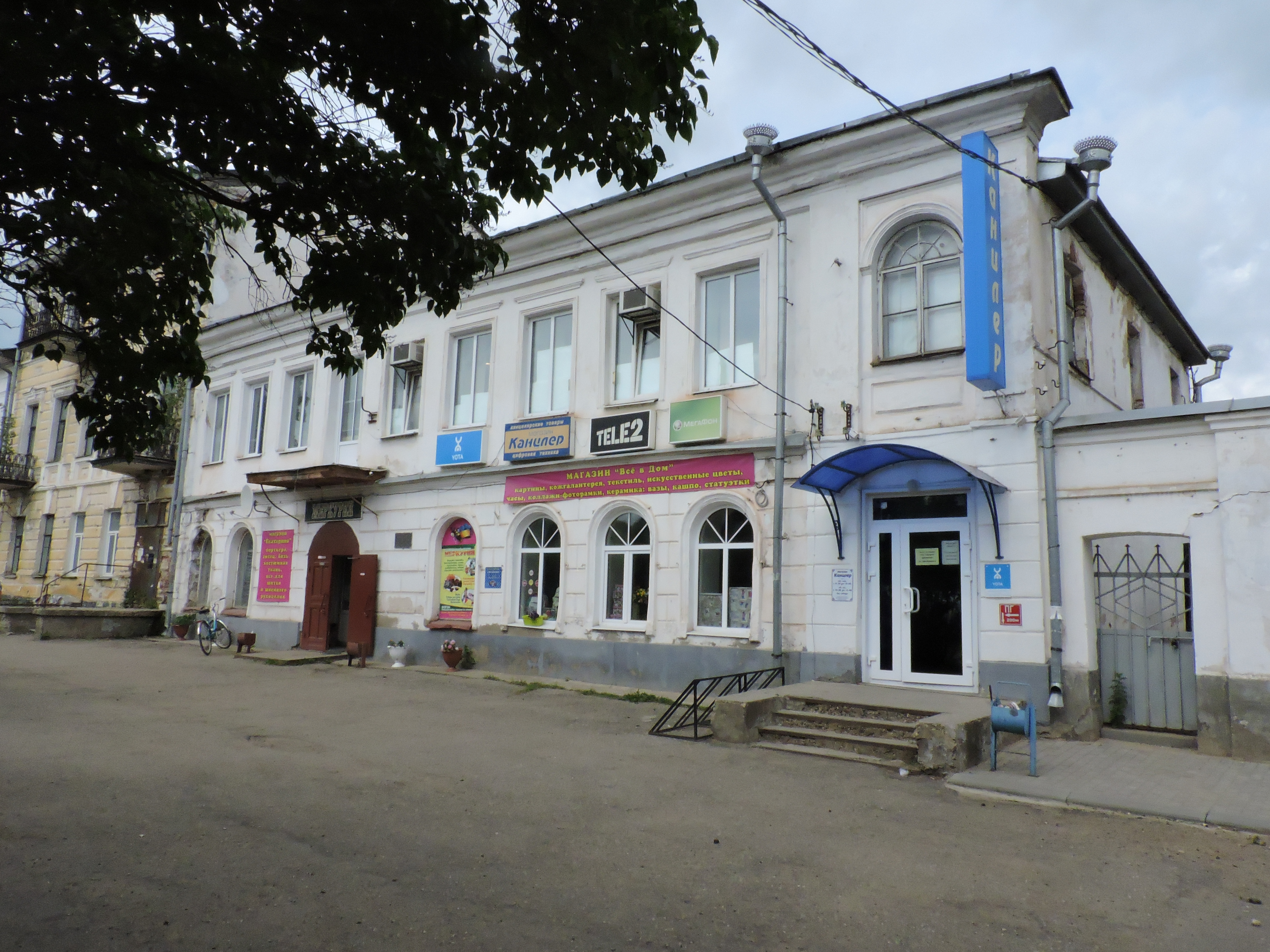 Дом Винцаса Петариса